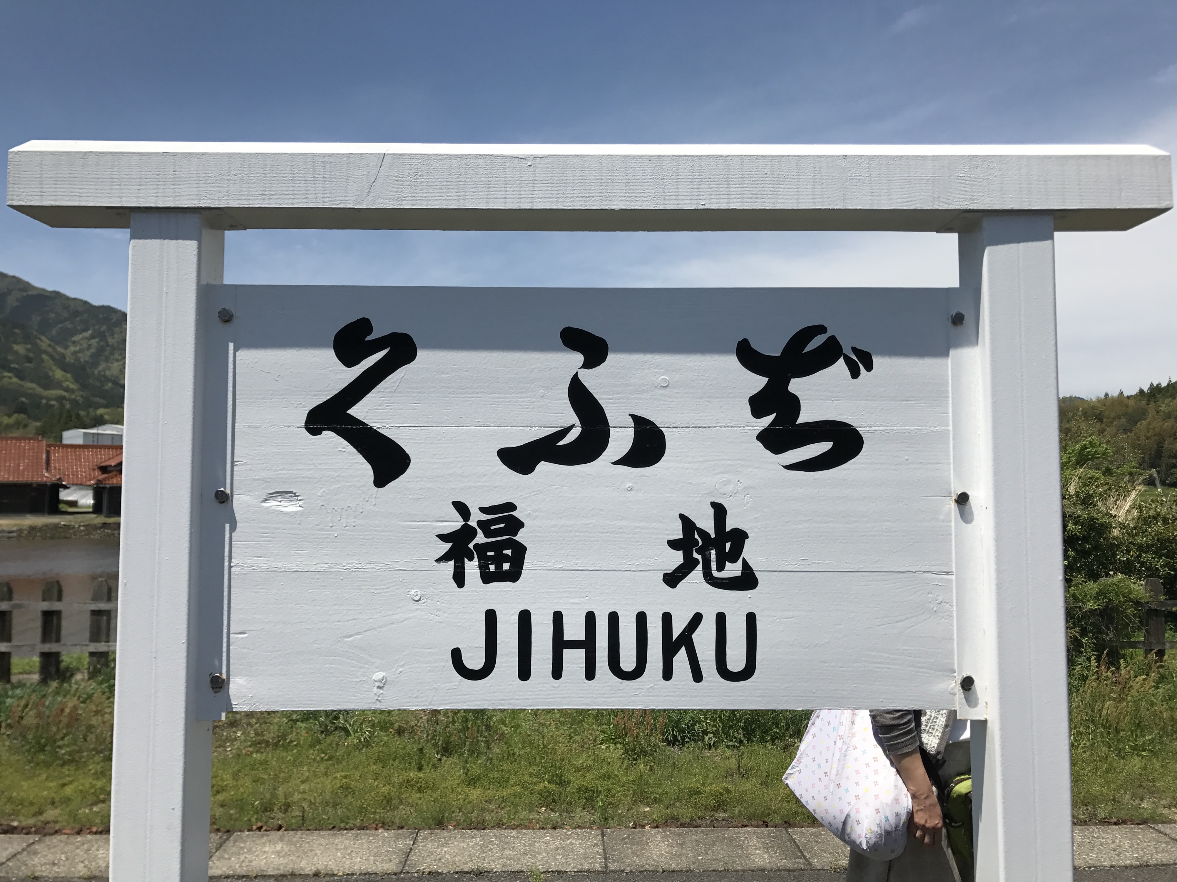 地福駅の観光用駅名標